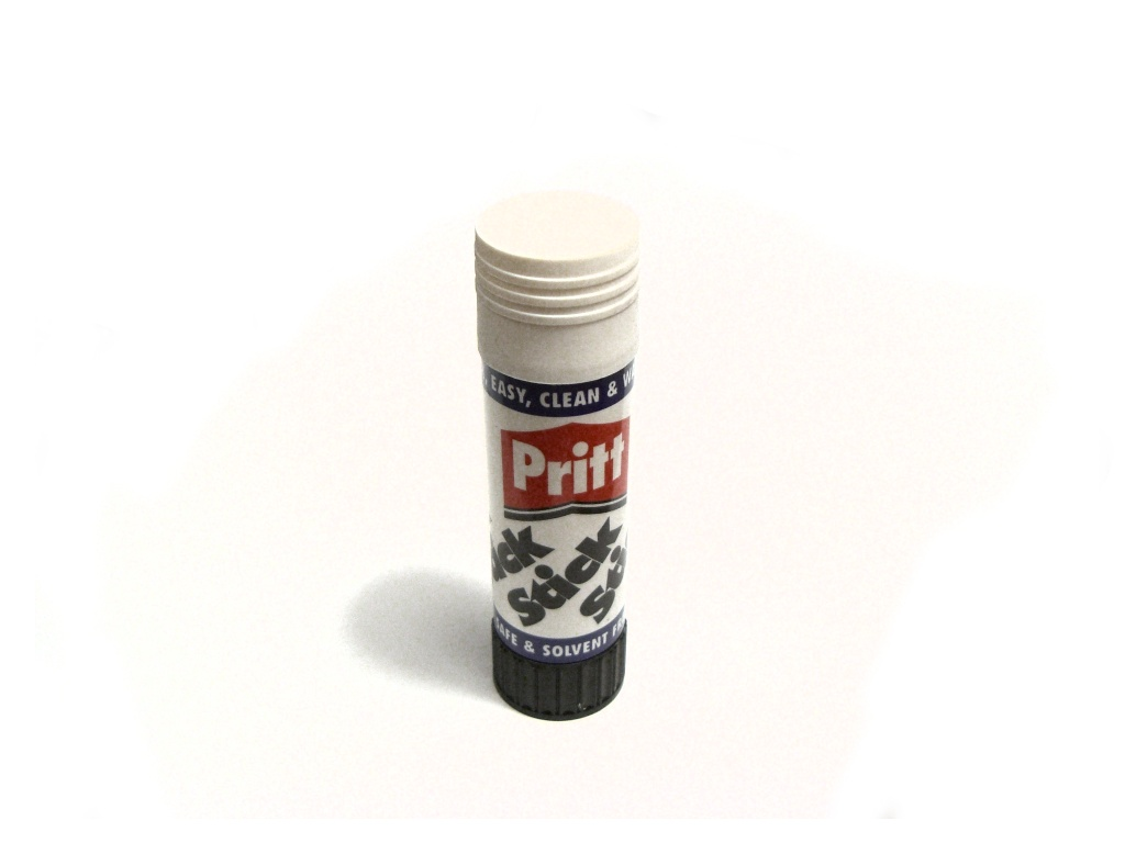 Pritt Klebestift